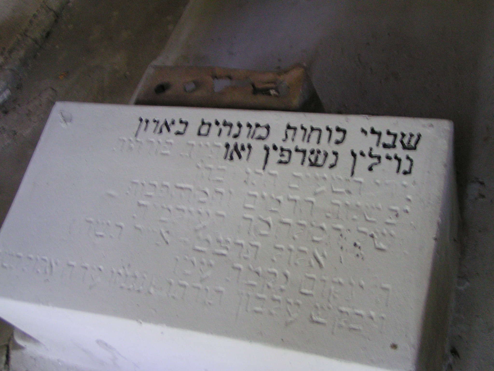 ספרי תורה מחוללים שנקברו בעיר פלטיצ'ן